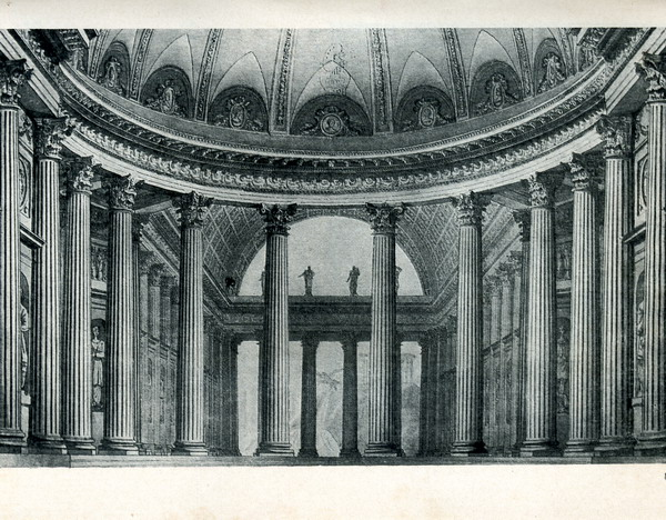 Колонна зала палацу: ескіз декорації